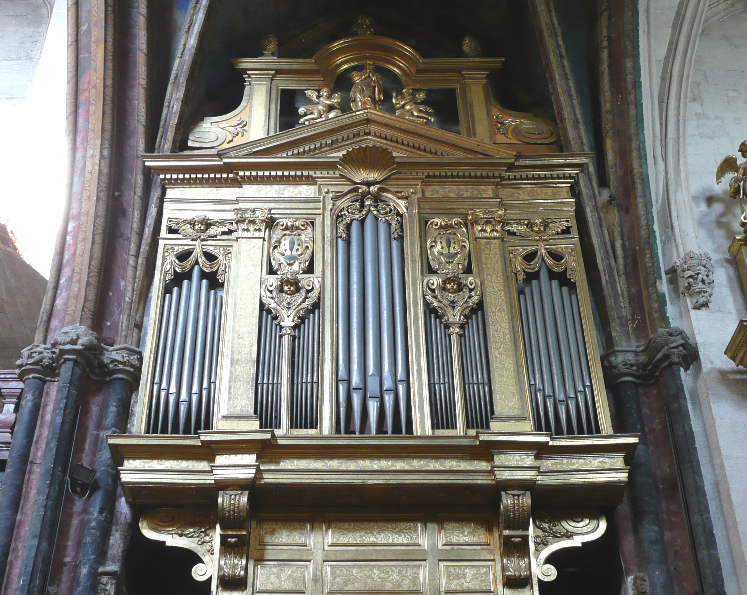 1827 restauration conservatrice de l'orgue de Royer par Giovanni Mentasti